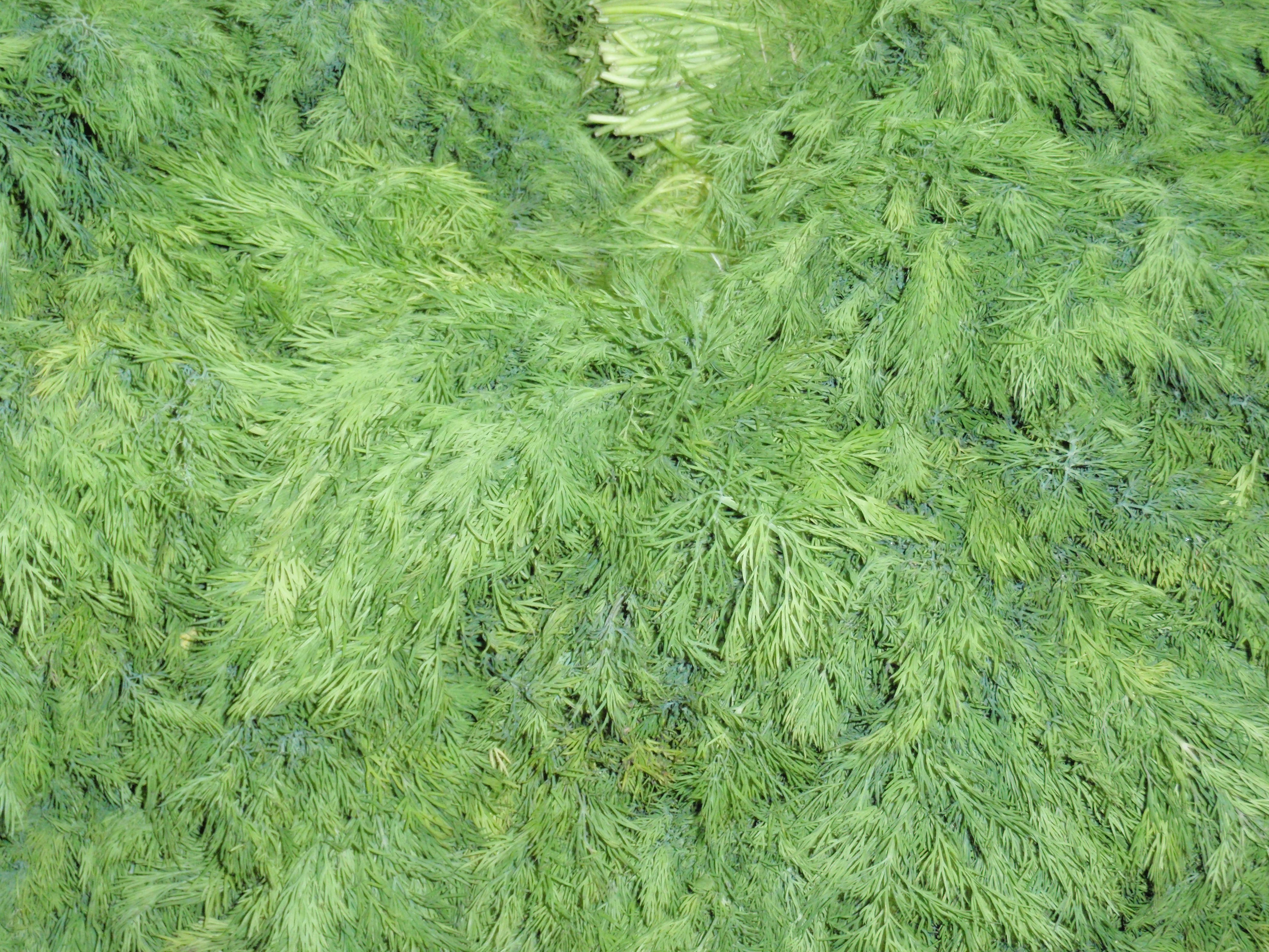 Shuk Hsayarim ירקות בשוק הסיירים